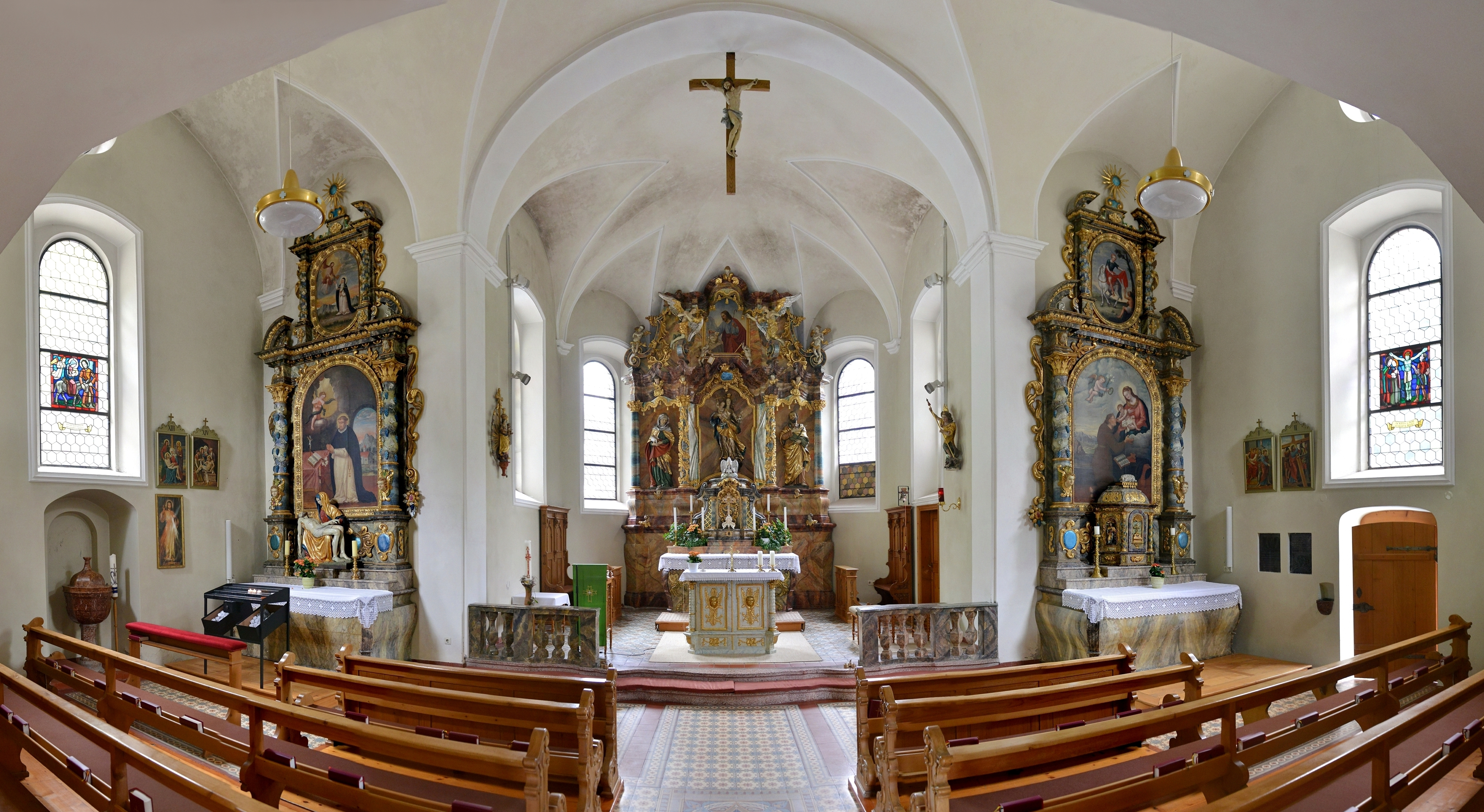 aus dem DEHIO Vorarlberg 1983: Buchbodner Pfarrkirche unserer lieben Frauen Mariä Gebut: Hochaltar, bez. 1761 (aus Bürs, 1903 aufgestellt); Viersäulen-Baldachinaufbau mit Voluntenaufsatz auf geschwungenem Grundriß mit reichem Rocailledekor; anstelle des Gemäldes Figur Immaculata (aus Hörbranz), Oberbild Guter Hirte, von Anton Jehly; 1903, Figuren unter Baldachin li. hl.Anna, re. hl. Josef von Gebhard Moosbrugger, 1903-1905; Gebälkengel und Putten, Johann Ladner zugeschrieben, 1761. - Tabernakel mir Rocailledekor, 1761.